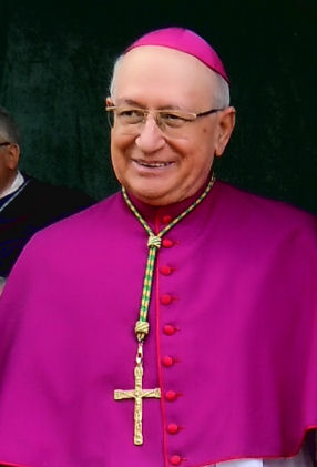 Mgr Giacinto Berloco, Nuntius